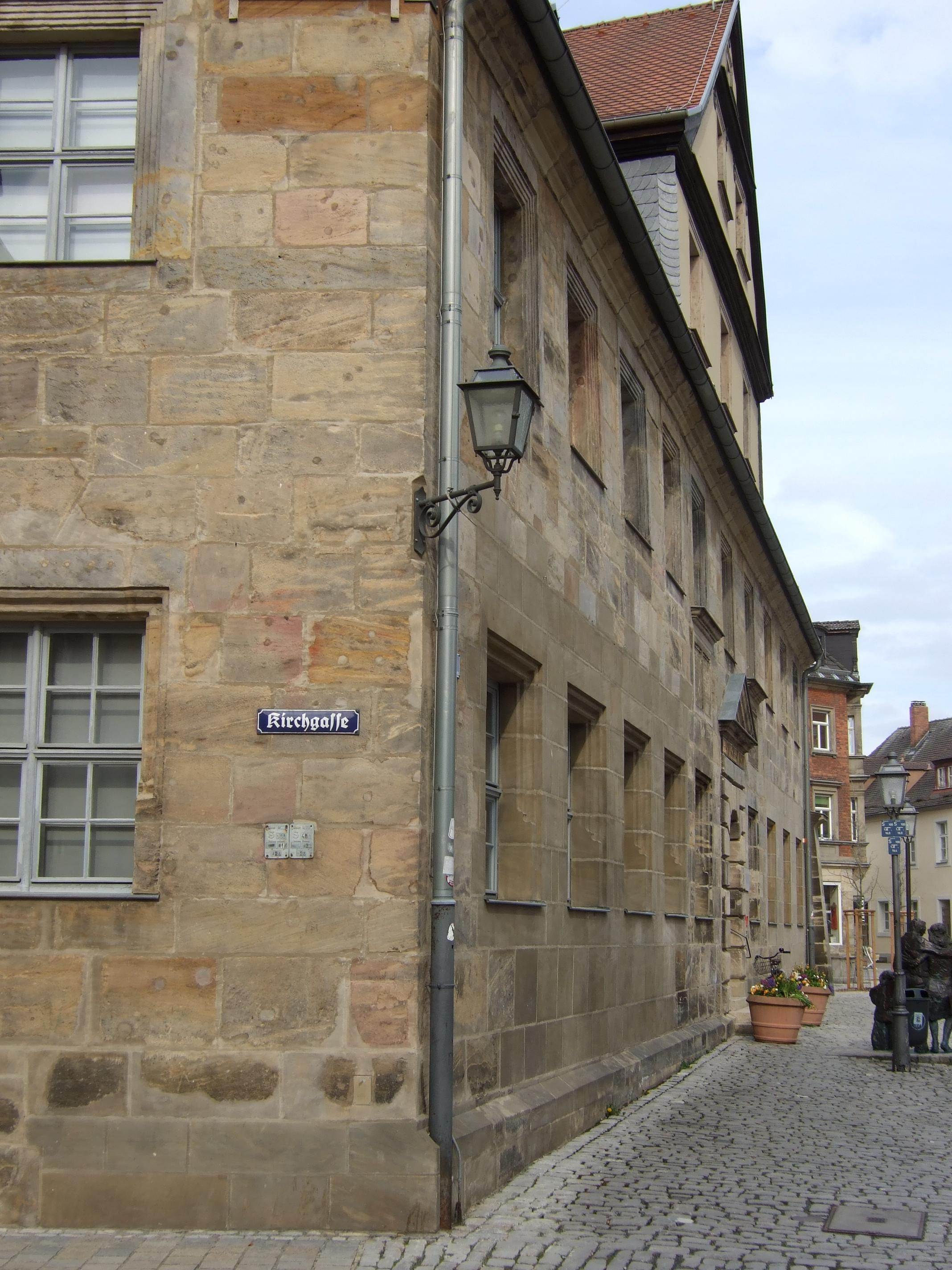 Historisches Museum Bayreuth